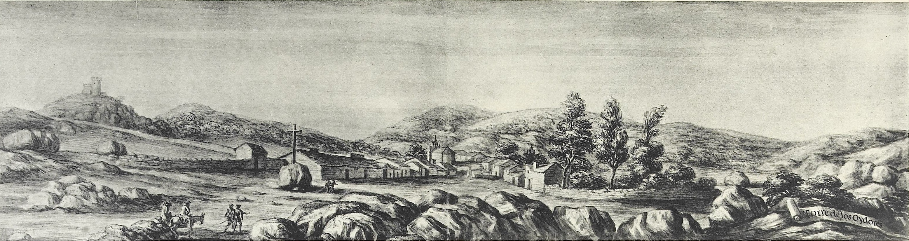 Torrelodones, acuarela de Pier Maria Baldi, Biblioteca Laurenciana de Florencia, recogida en Sánchez Rivero A, Mariutti de Sánchez Rivero A. "Viaje de Cosme de Médicis por España y Portugal (1668-1669)", Madrid: Sucesores de Rivadeneyra; 1933